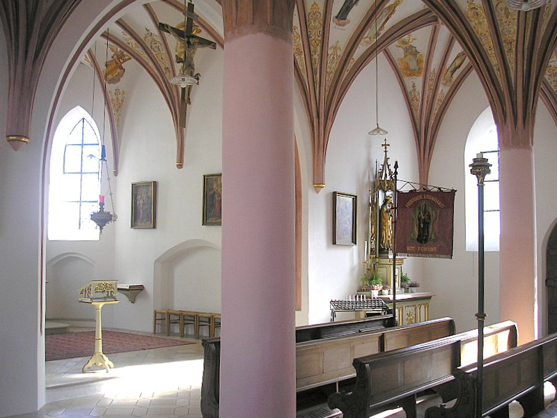 St. Leonhard (Fürstenfeldbruck, Oberbayern). Langhaus und Chor. Eigene Aufnahme, Jan. 2007 / St. Leonhard (Fürstenfeldbruck, Upper Bavaria, Germany). Nave and choir. Own photo, Jan. 2007